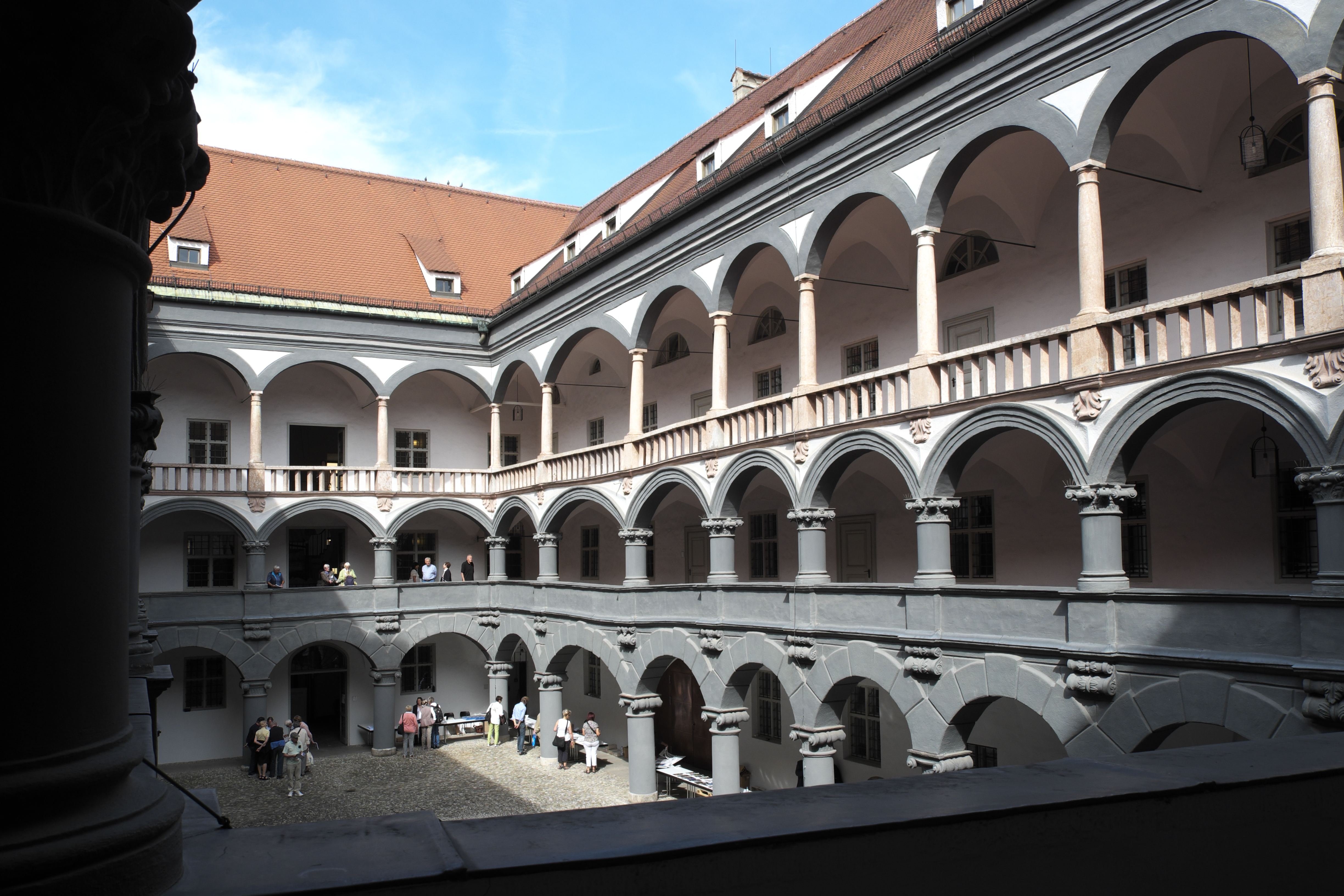 Alte Münze, heute Bayerisches Landesamt für Denkmalpflege, im Stadtteil Altstadt (München) im Stadtbezirk Altstadt-Lehel in München (Bayern/Deutschland)